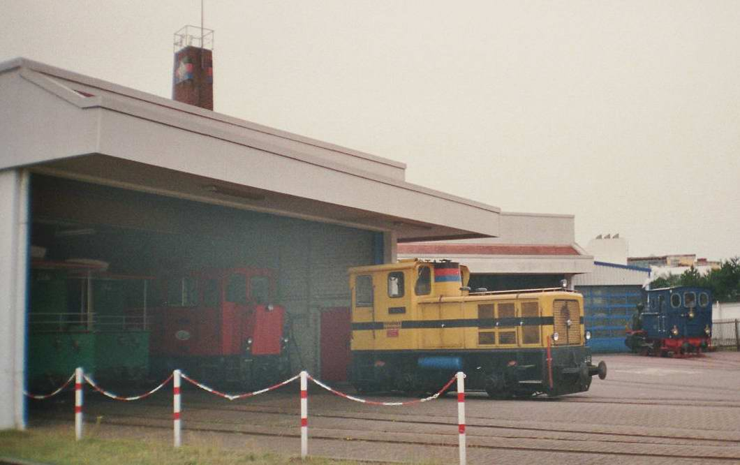 Das Bahnbetriebswerk auf der Insel Borkum.